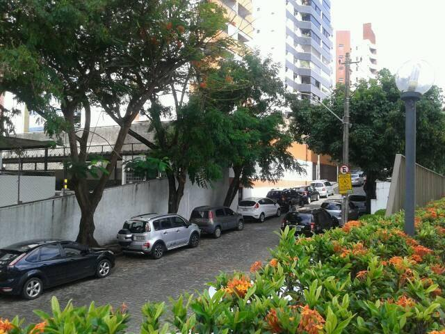 Pituba, Salvador, Bahia